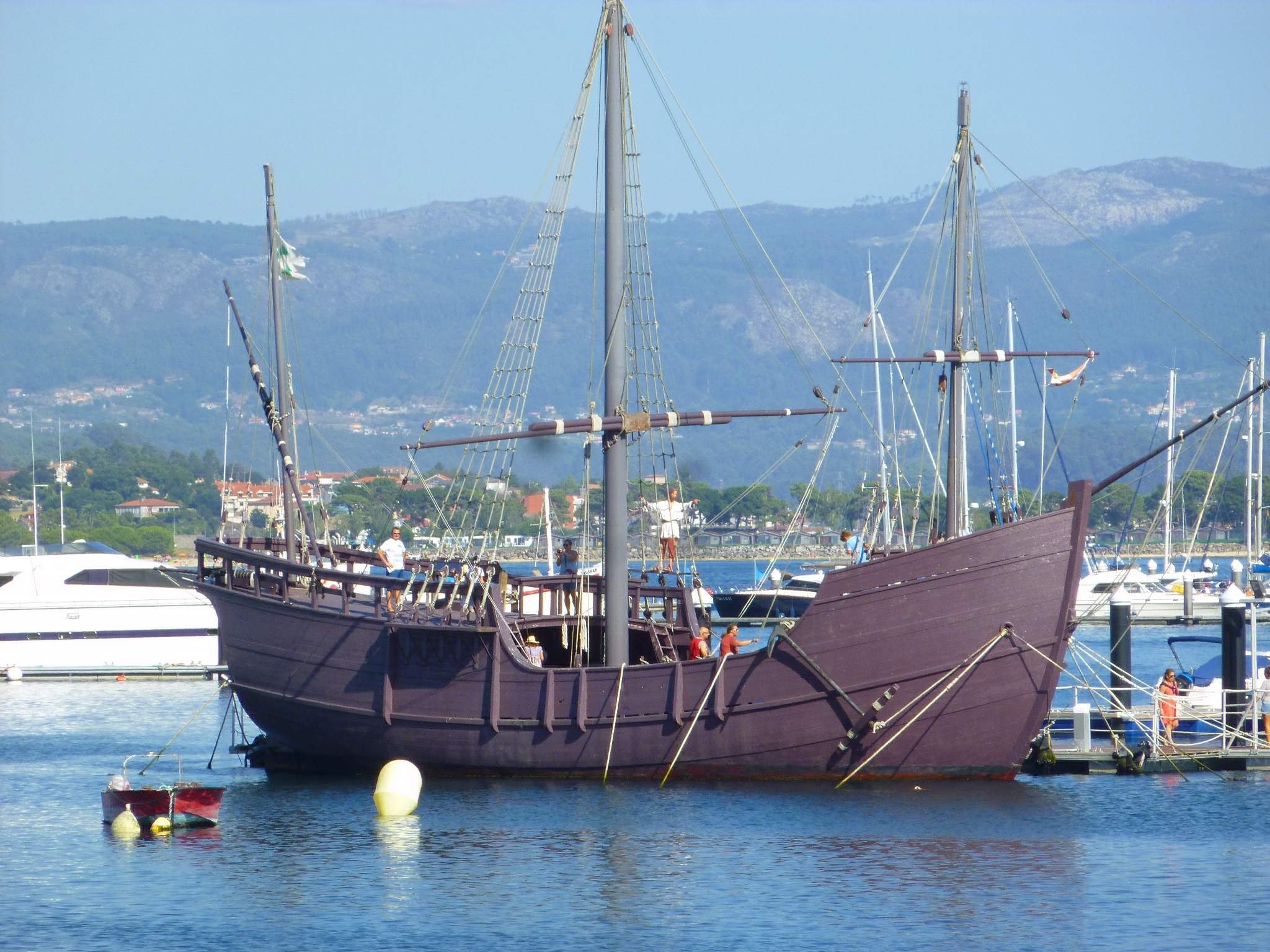 Baiona - Museo-Réplica de la Carabela Pinta